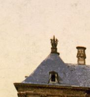 Voorbeeld van retoucheren. Afbeelding is een bewerk detail van File:Paleis op de dam 1900.jpg, wat een public domain foto is van het Library of Congress